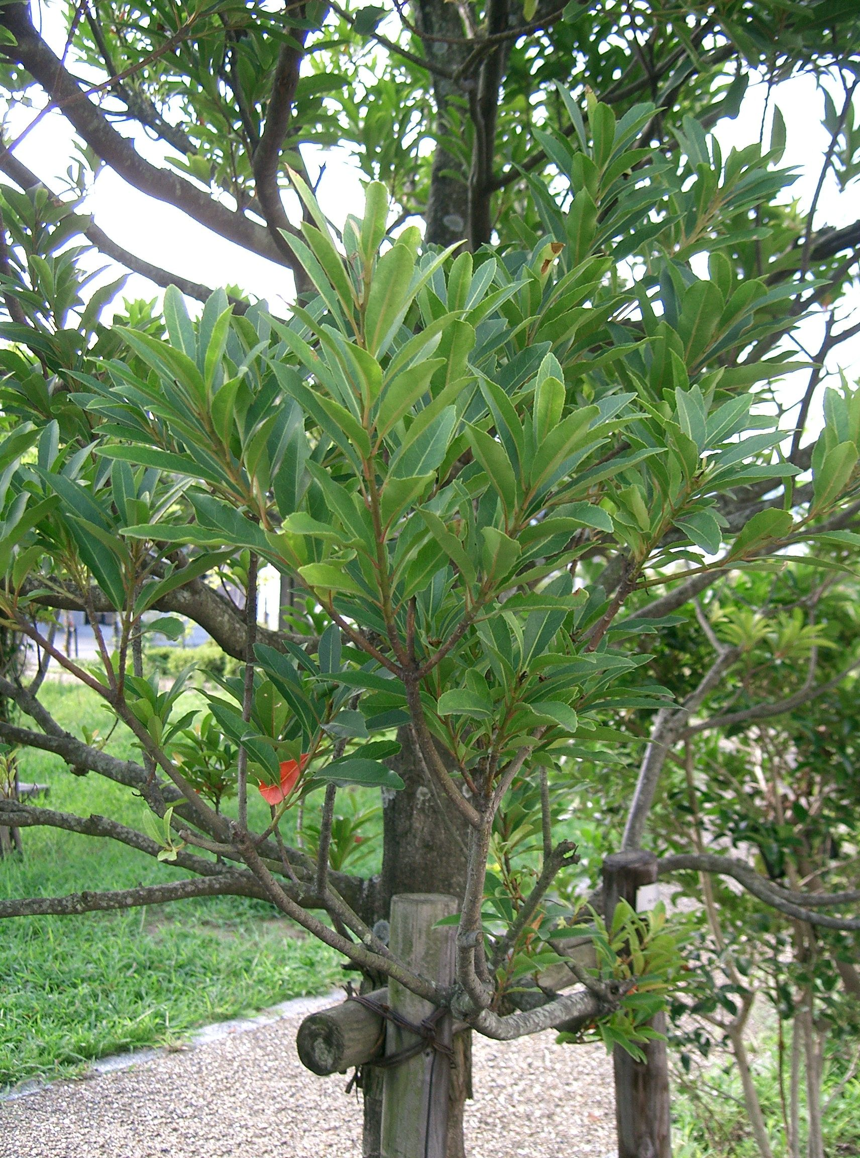 Elaeocarpus sylvestris var. ellipticus